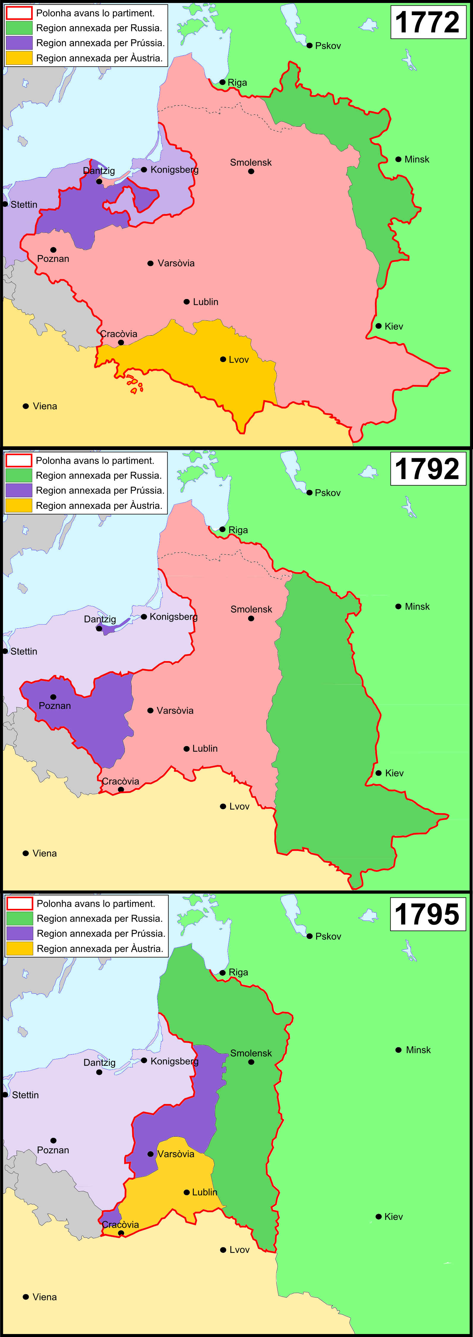 Partiments de Polonha entre 1772 e 1795.